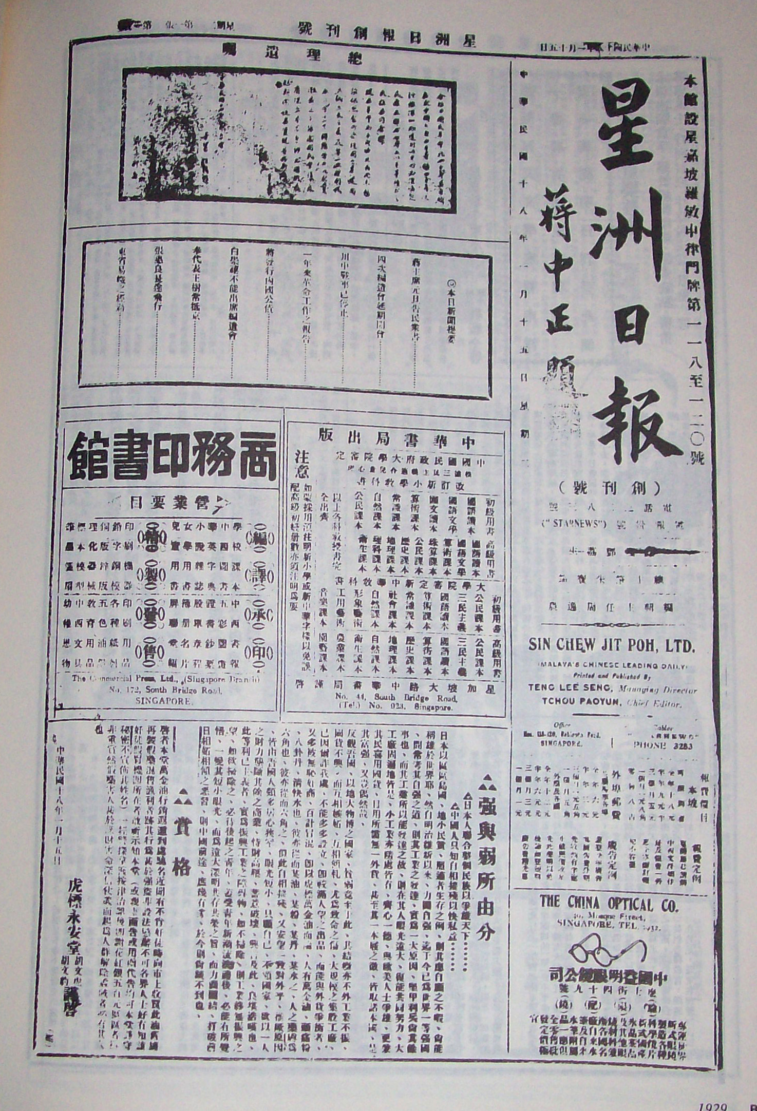 中文（新加坡）: 1929星洲日报创刊号